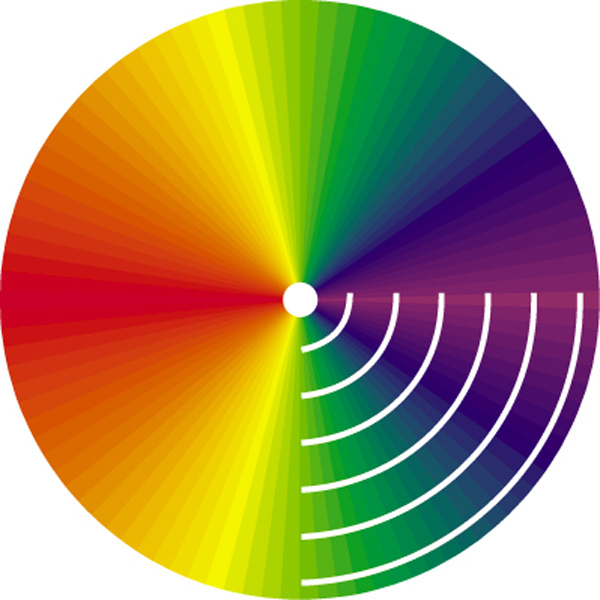 Logo du Magazine gai Le Point